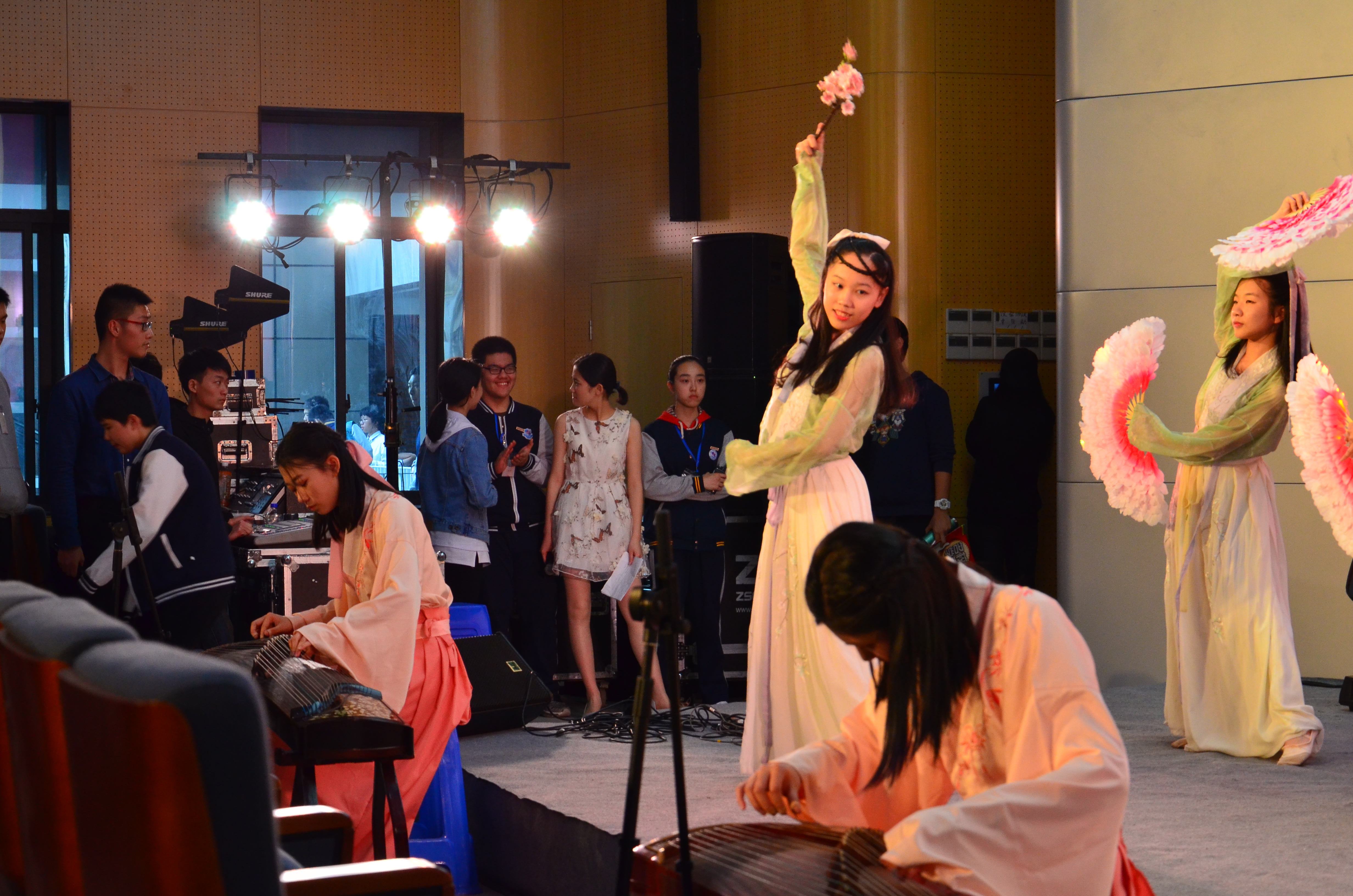 2017福州三中社巡中心舞台古风社表演的歌舞《司花令》。